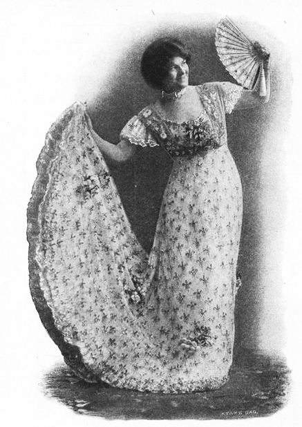 Sigrid Eklöf-Trobäck (1873-1948)